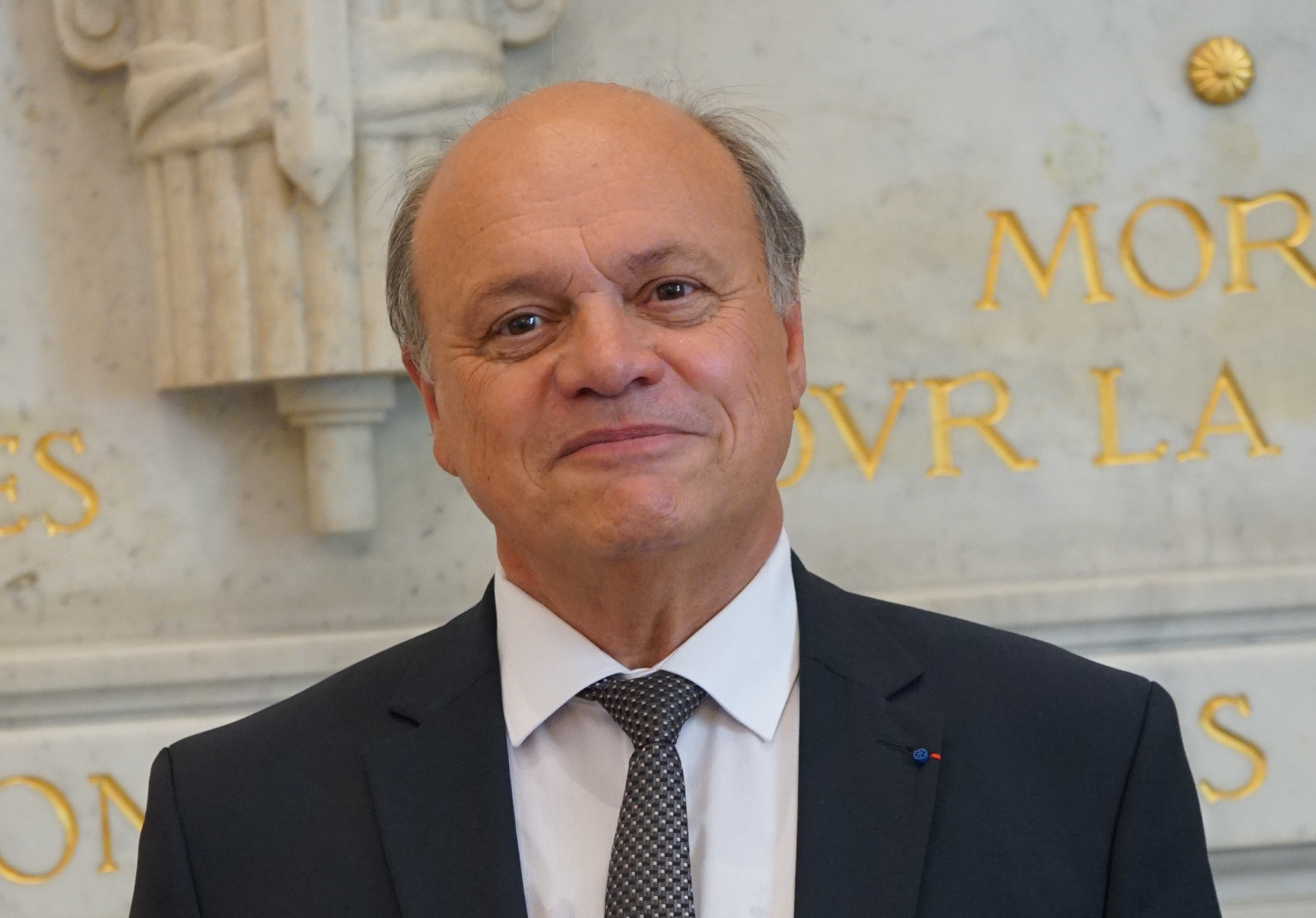 le député salle des quatre colonnes.